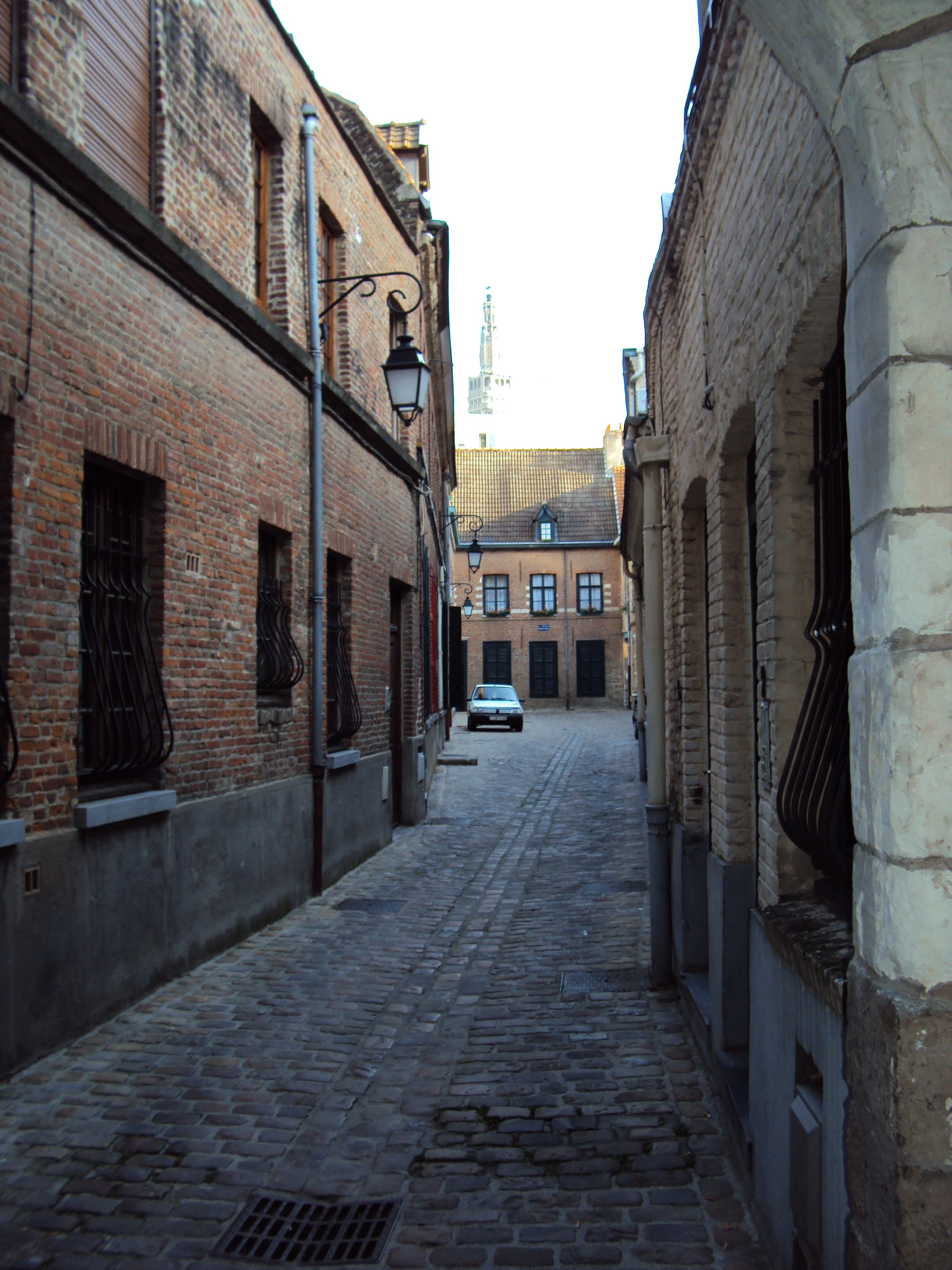 Site des Brigittines de Lille (France)